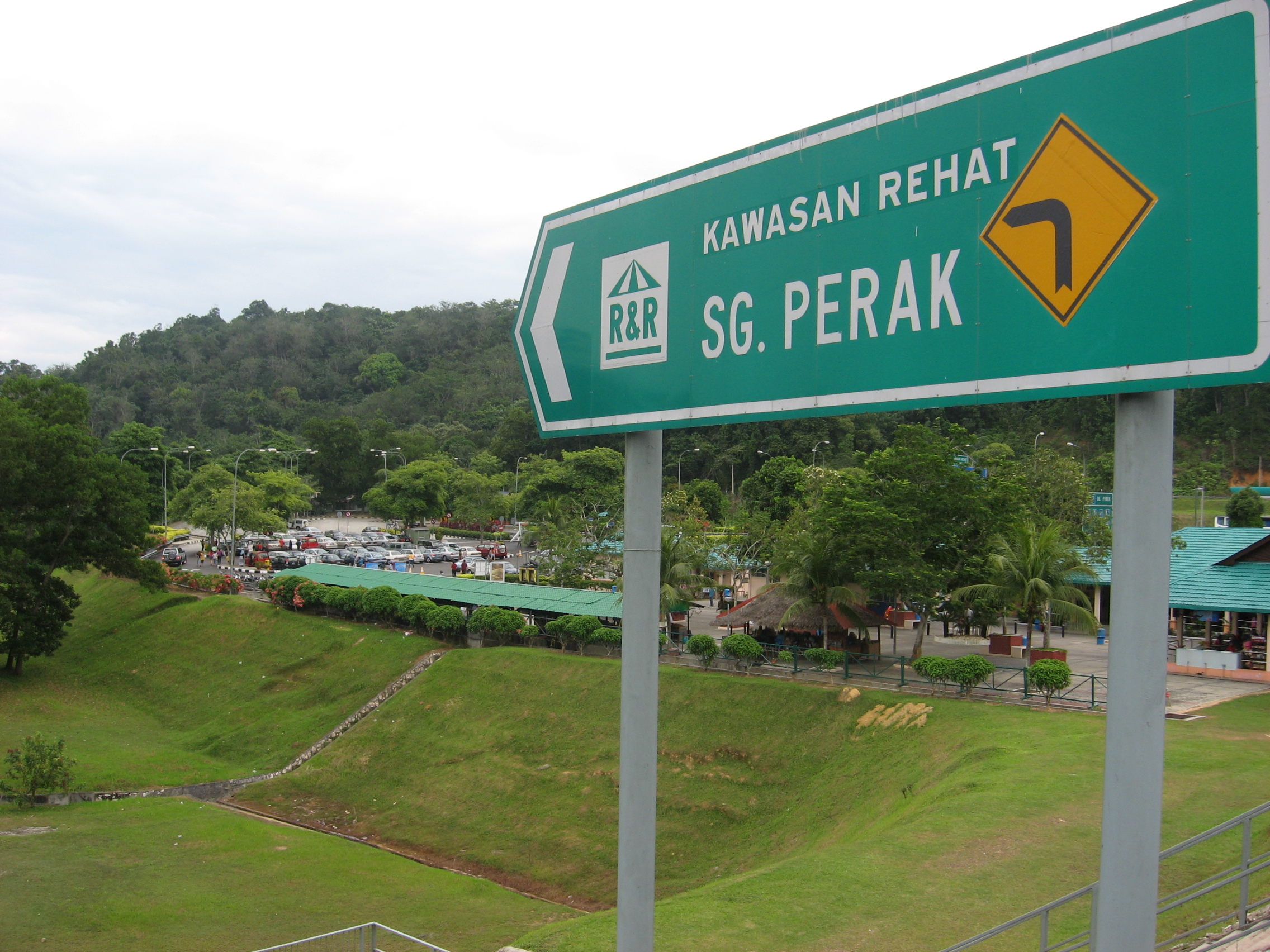 Tabdulla 22:50, 5 January 2007 (UTC)